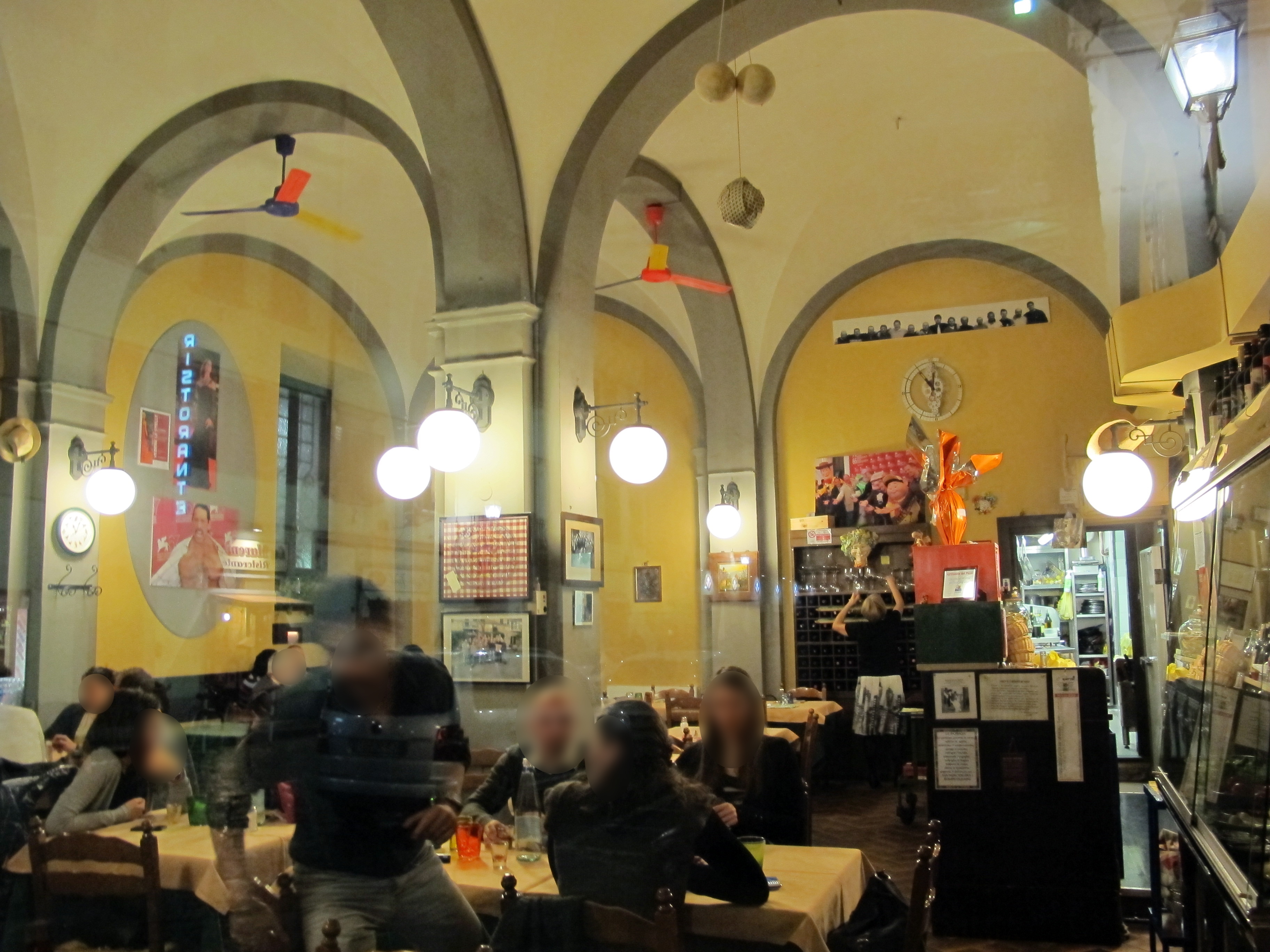 Palazzo Bartolini Salimbeni-Lenzoni, interno